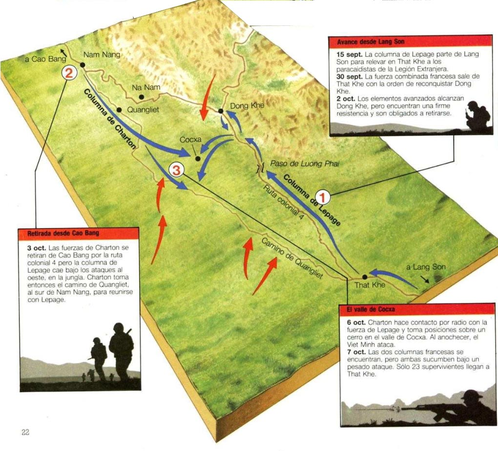 Evolución de la Batalla de Cao Bang.